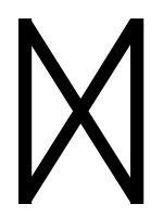 runic letter dagaz